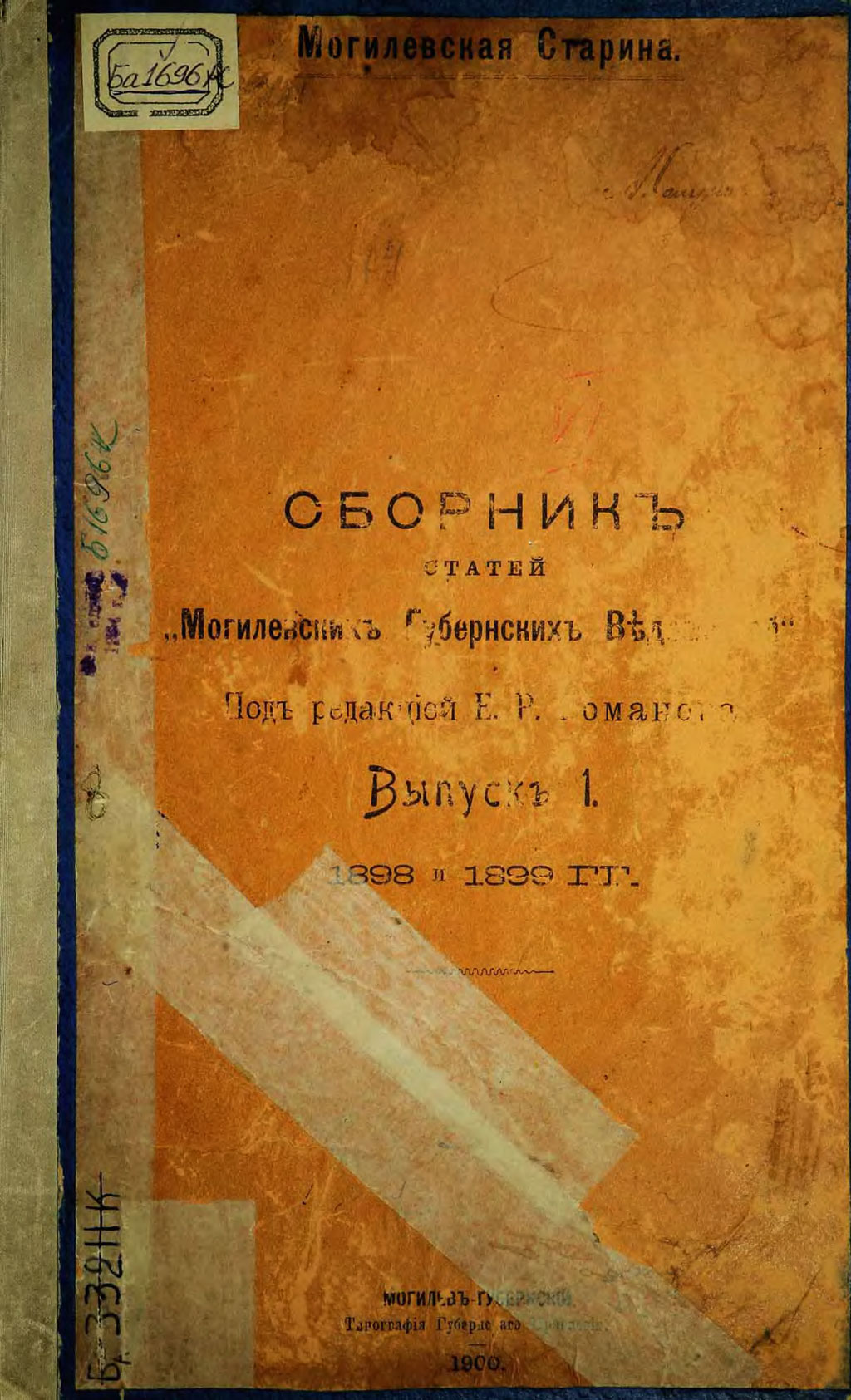 Сборник Могилёвская старина